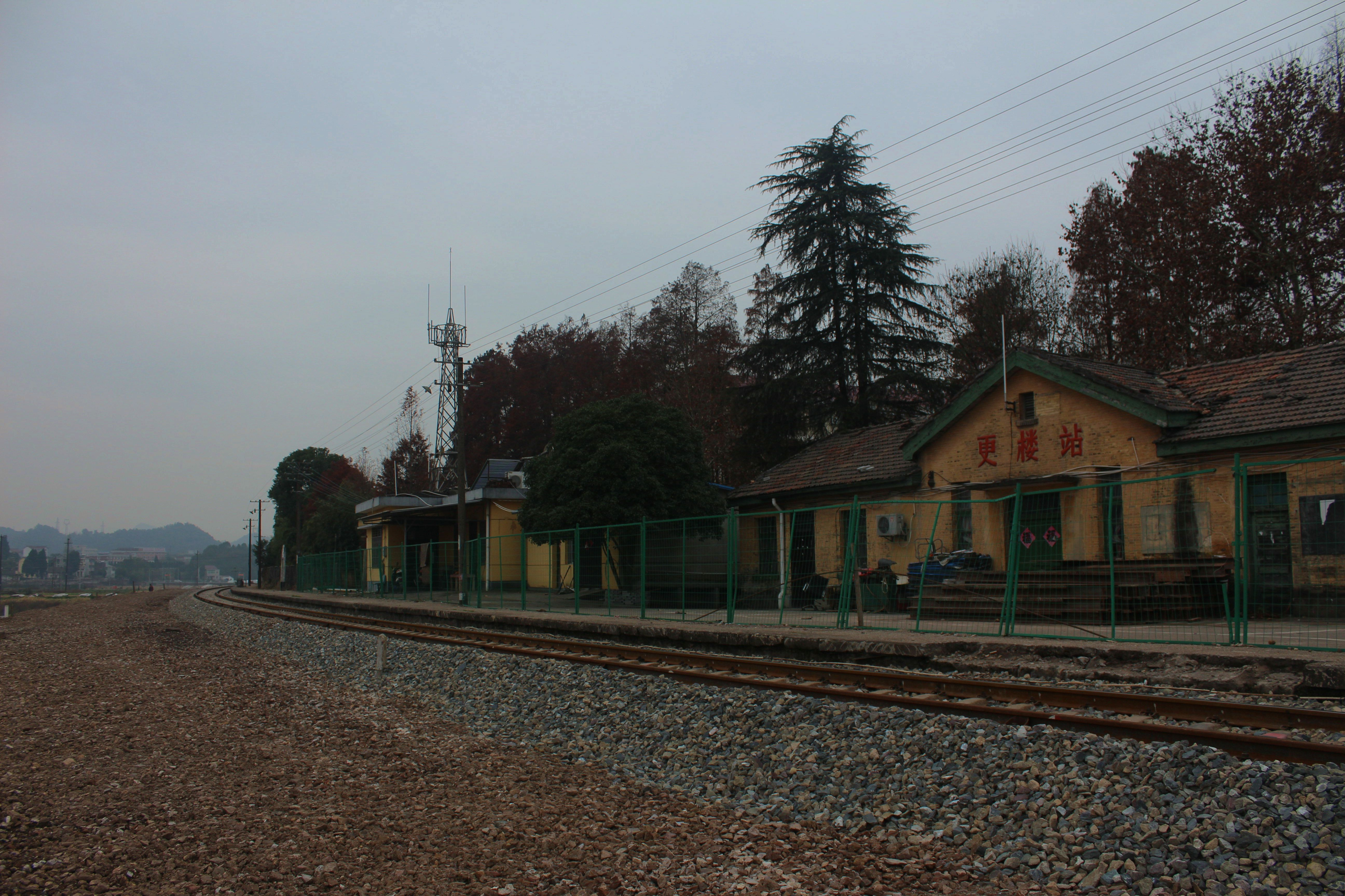 中文（中国大陆）: 金千线更楼站（目前已废）全貌